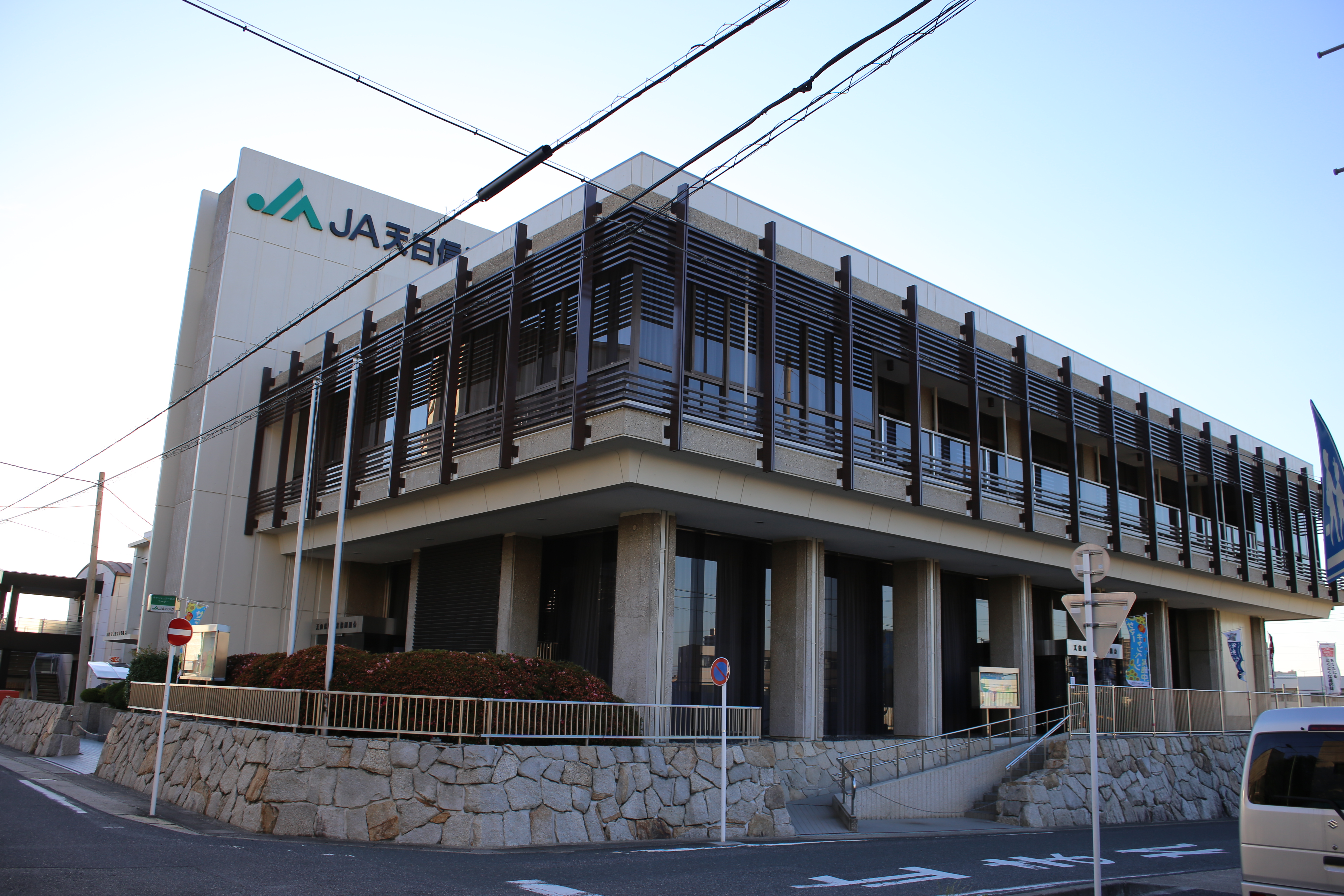 名古屋市天白区池場二丁目の天白信用農業協同組合本店を南側公道東側より撮影